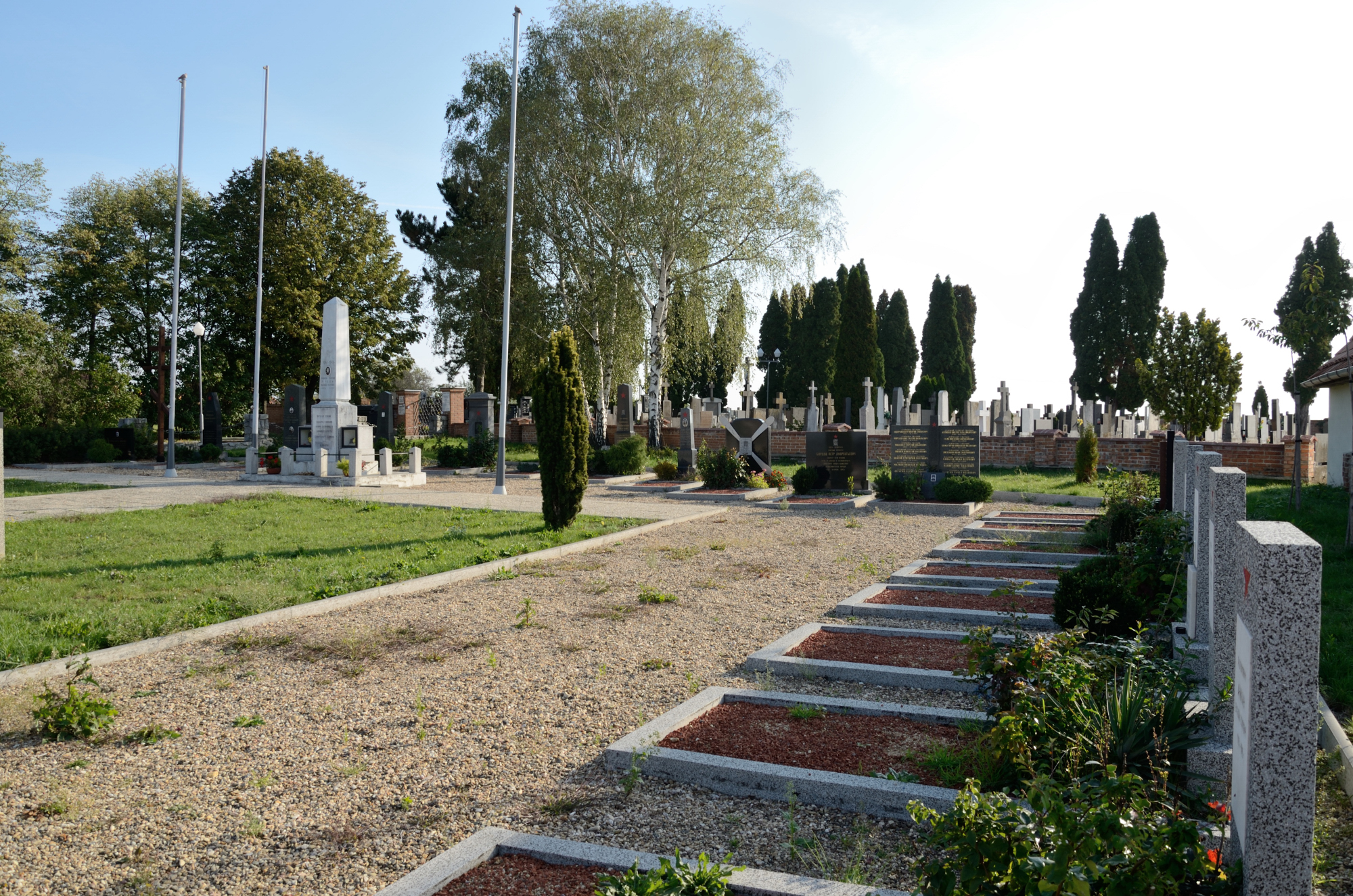 Hřbitov Rudé armády (Ořechov), Syrovická, JV okraj obce, Ořechov